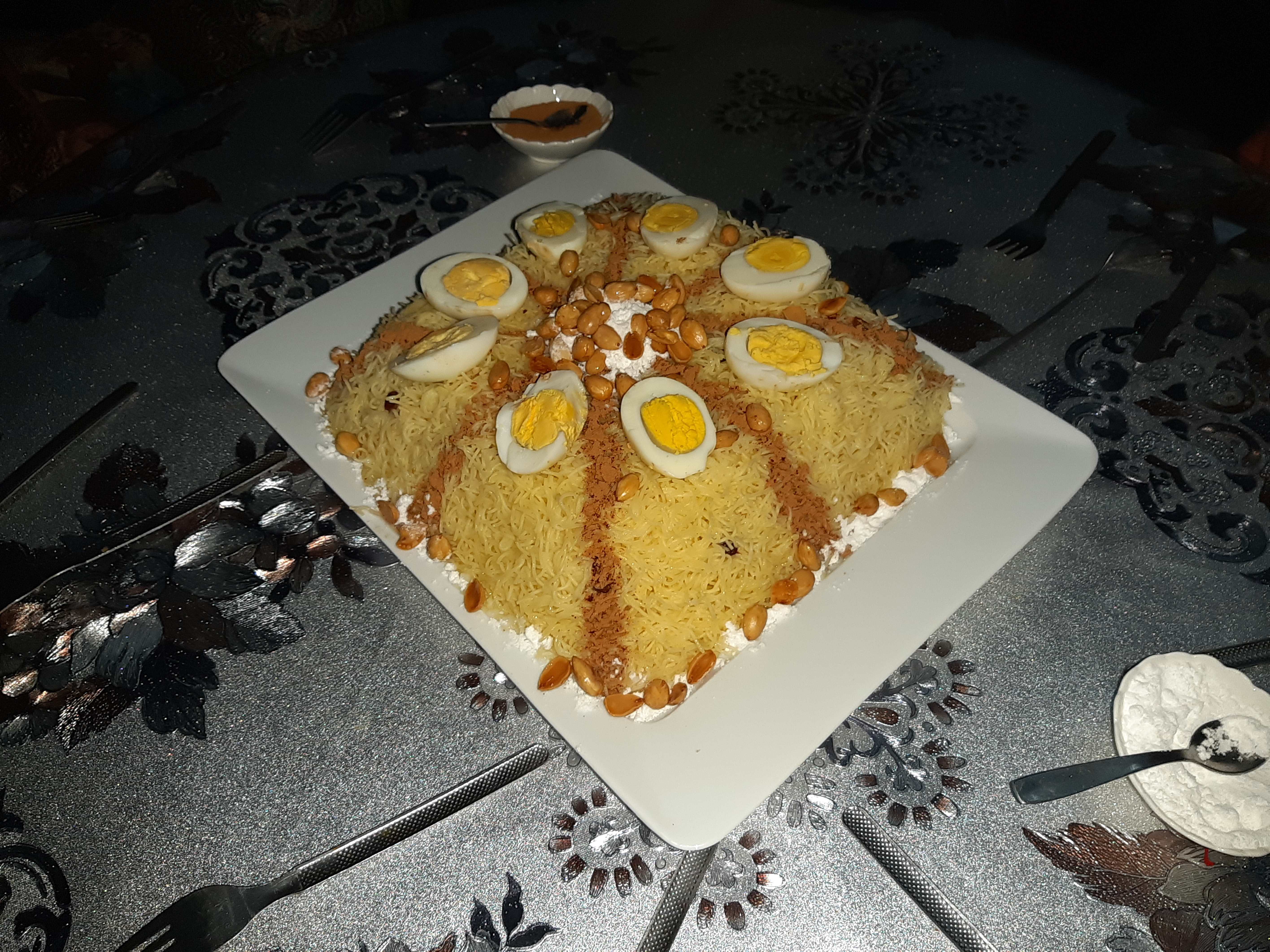 Seffa, un plat typique de la cuisine marocaine